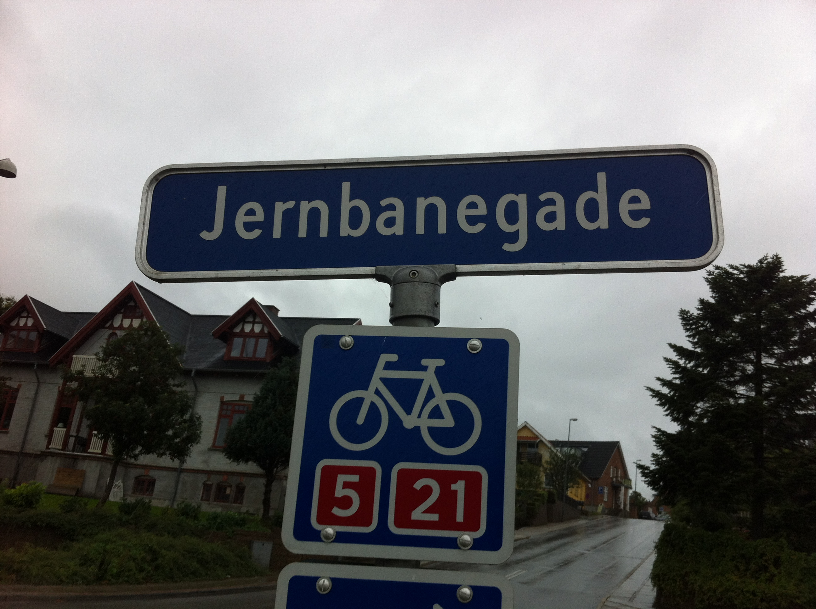 Jernbanegades vej skilt i Hadsund. I baggrunden ses Doktorbakken og det store grå hus til venstre er Jacob Møllers villa.